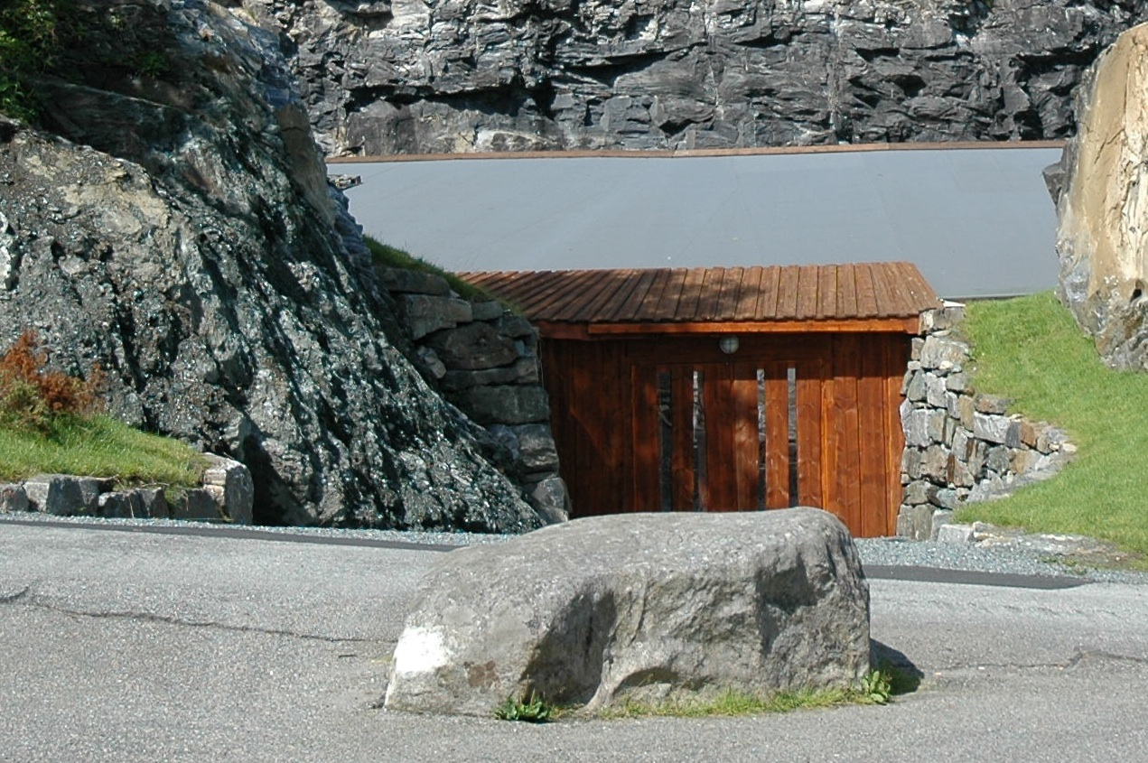 Tingsteinen ved Moster Amfi.